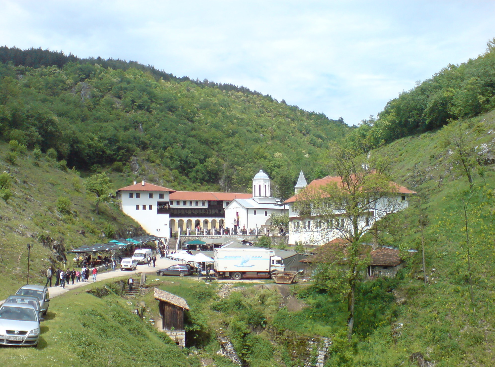 Србски Православни манастир Света Тројица (Serbian Orthodox Monastery Holy Trinity)